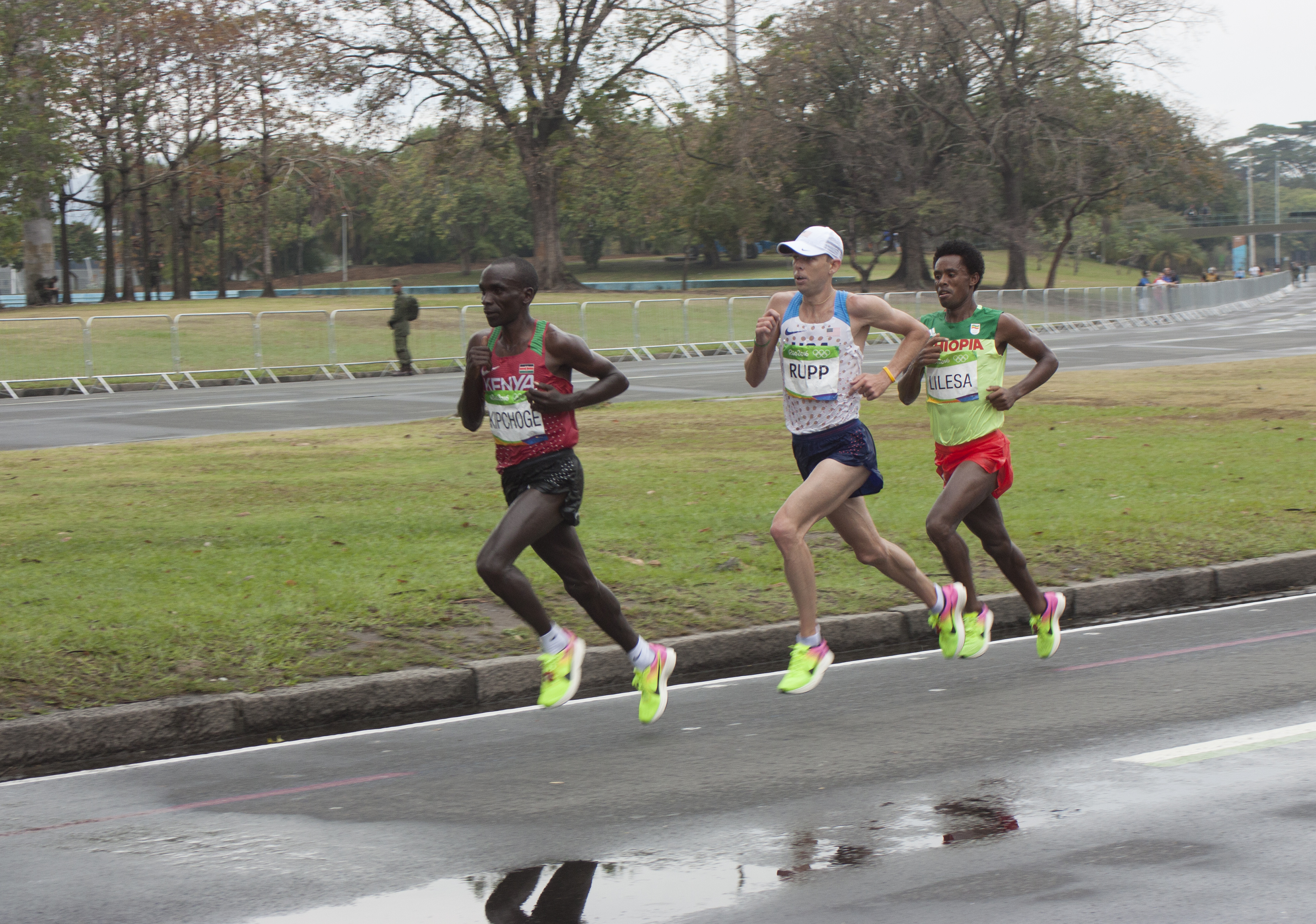 Tirada em 21 de agosto, às 11:24 durante última passagem pelo Aterro do Flamengo, a cerca de 40 minutos do final.